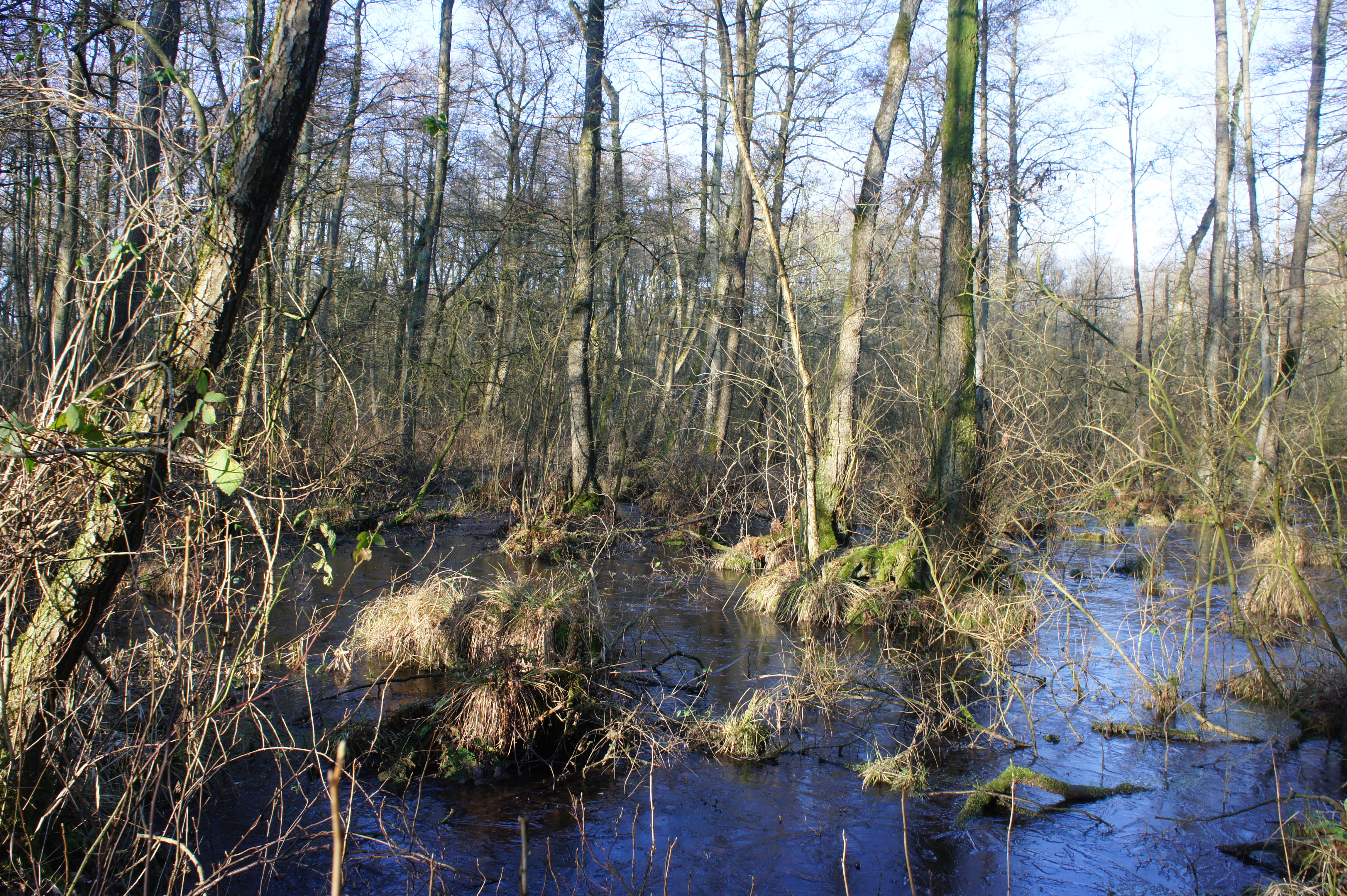 Das Pestruper Moor im Winter 2014